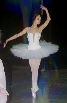 Фотография с диска Анастасии Федоренко «Донецк. Увидеть и полюбить».